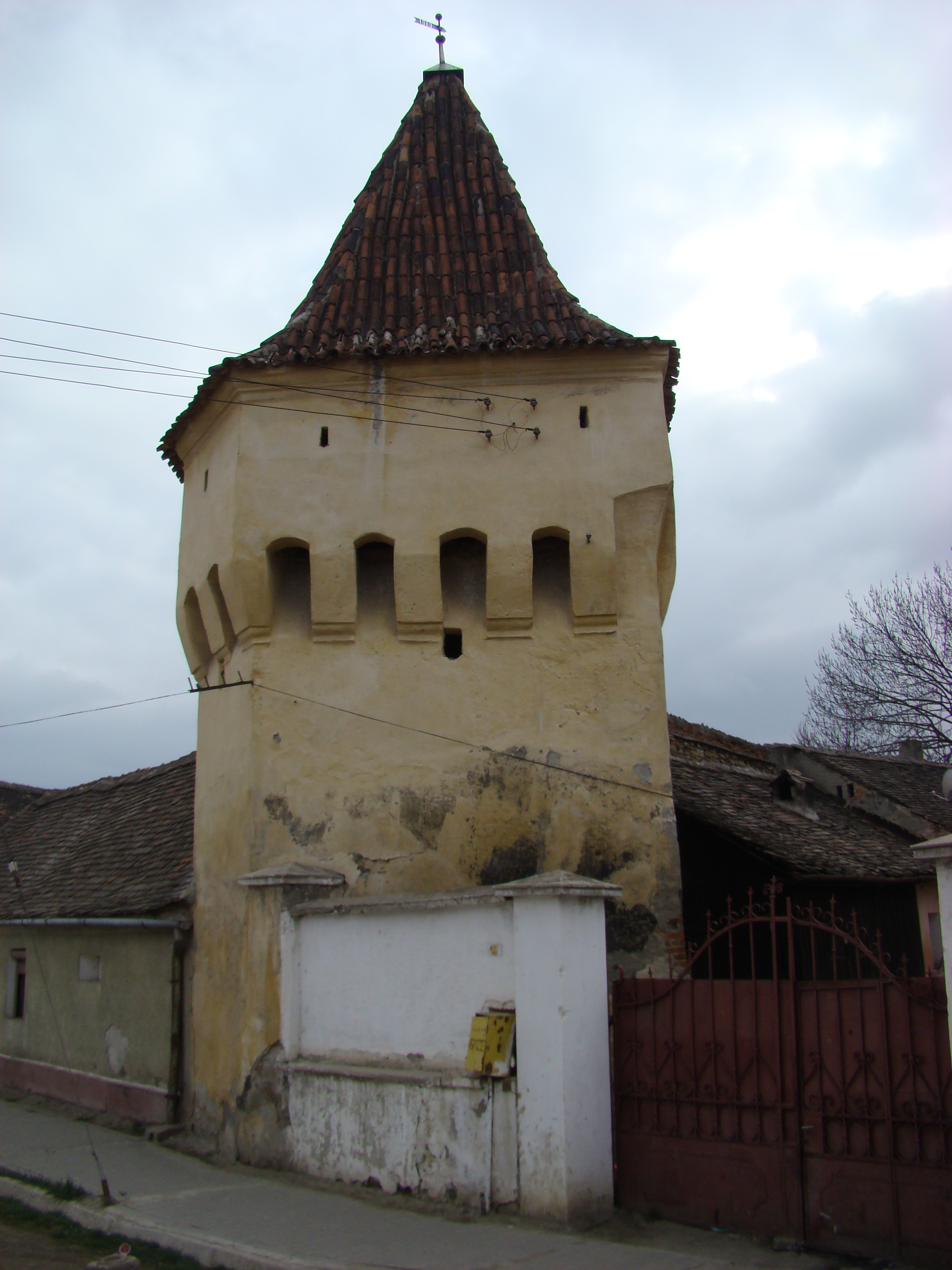 Biserica evanghelică fortificată, sat TÂRNAVA; comuna TÂRNAVA, județul Sibiu 03